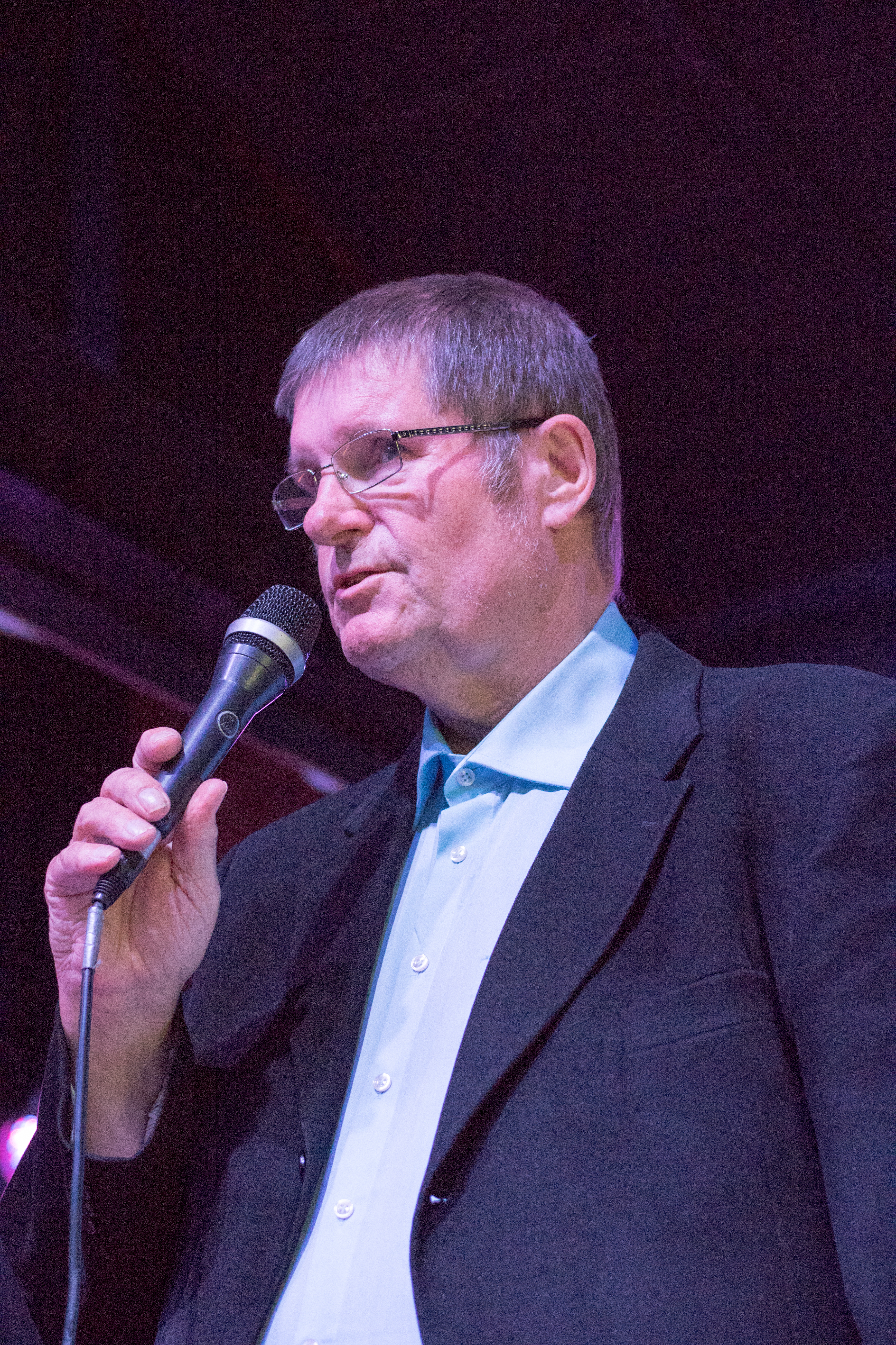 Matti Siitonen suomalainen laulaja